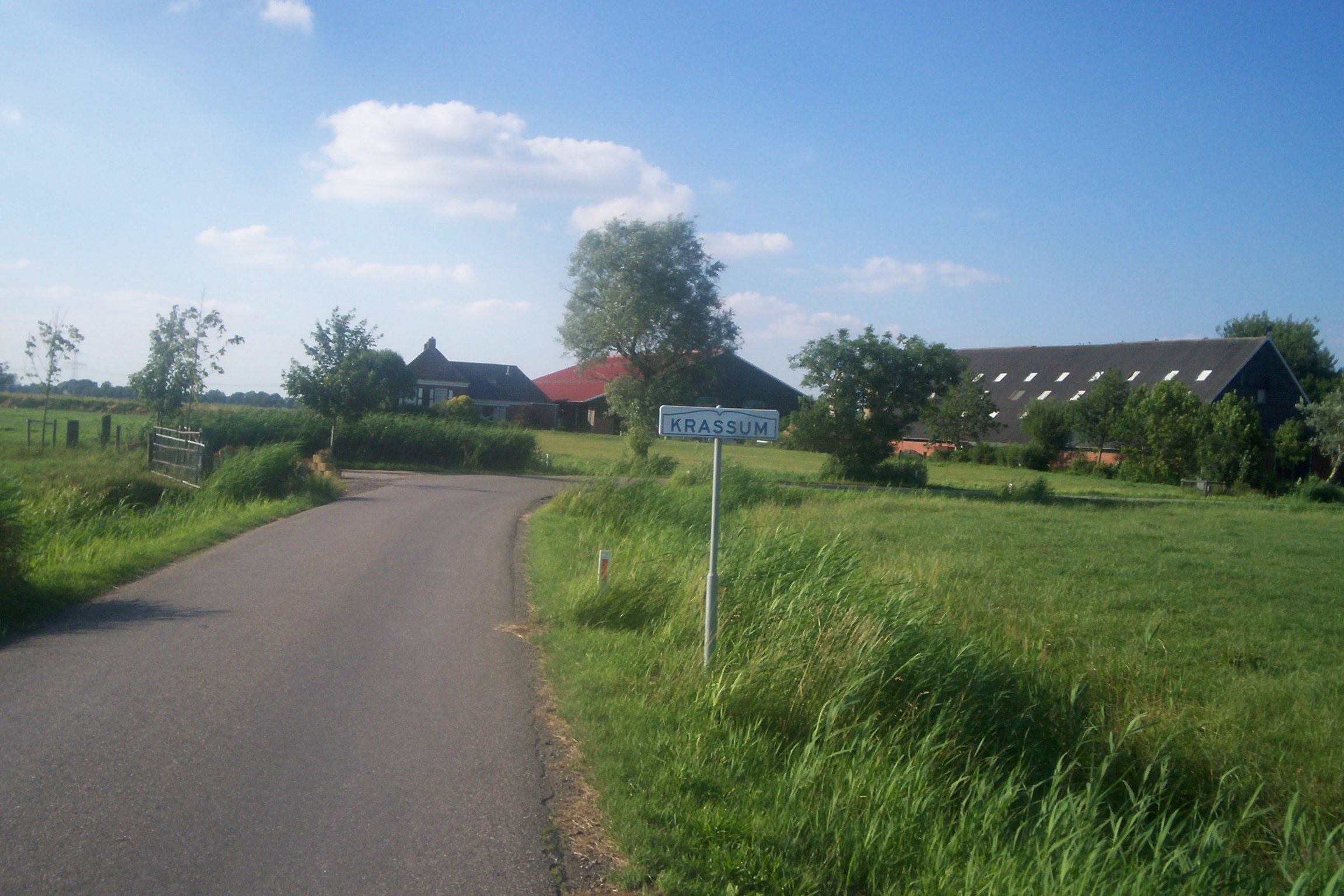 Krassum.